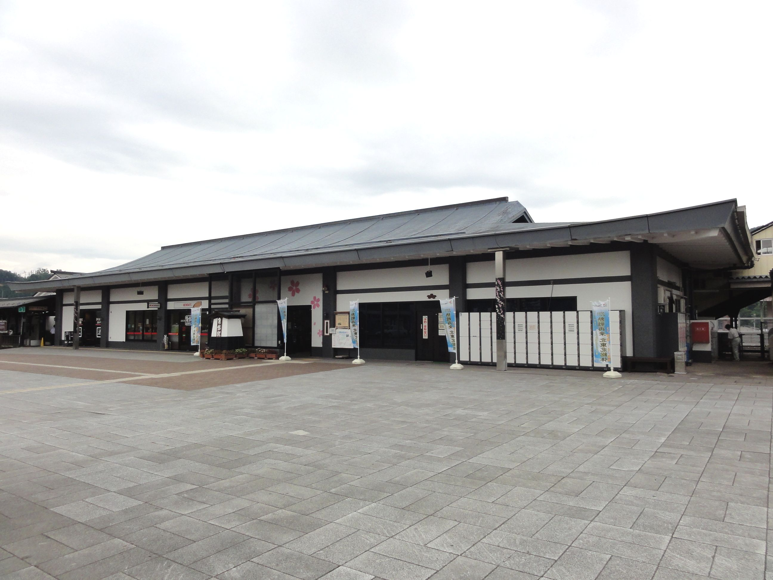 JR角館駅